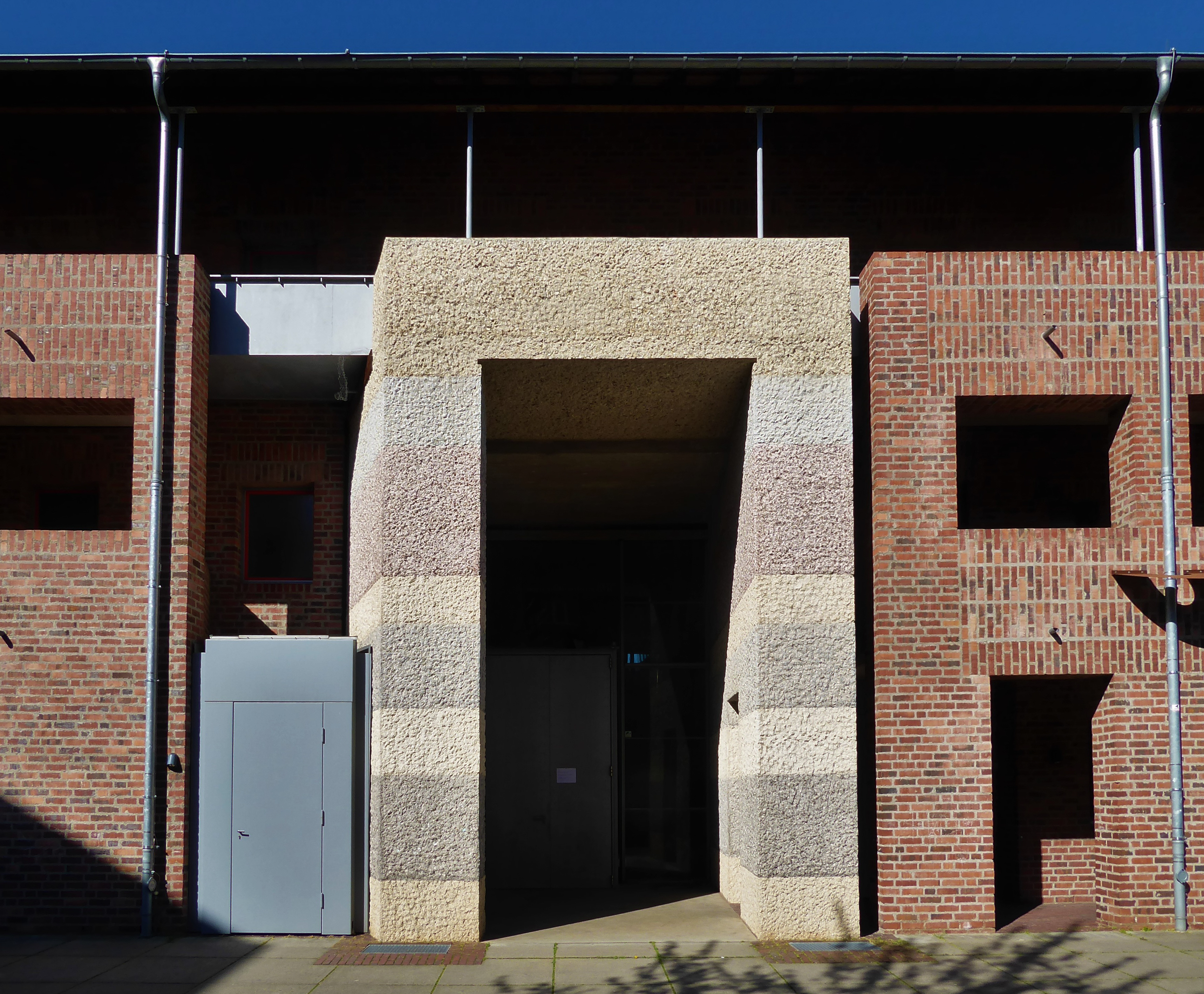 Gemeindezentrum St. Katharina von Siena (Köln-Blumenberg)